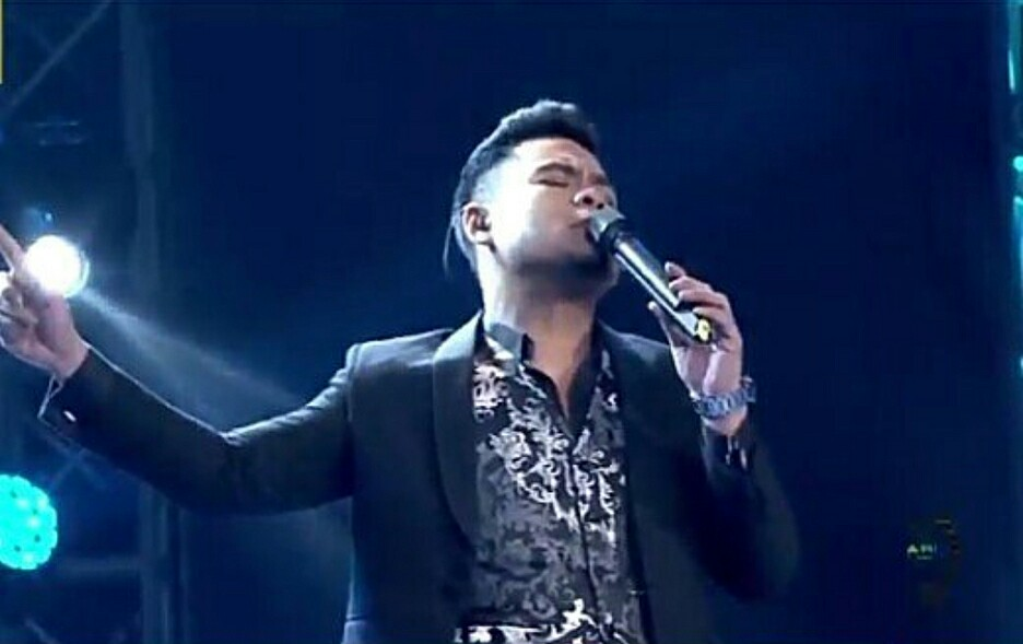 Syamel ketika membuat persembahan di ABU TV Song Festival 2017